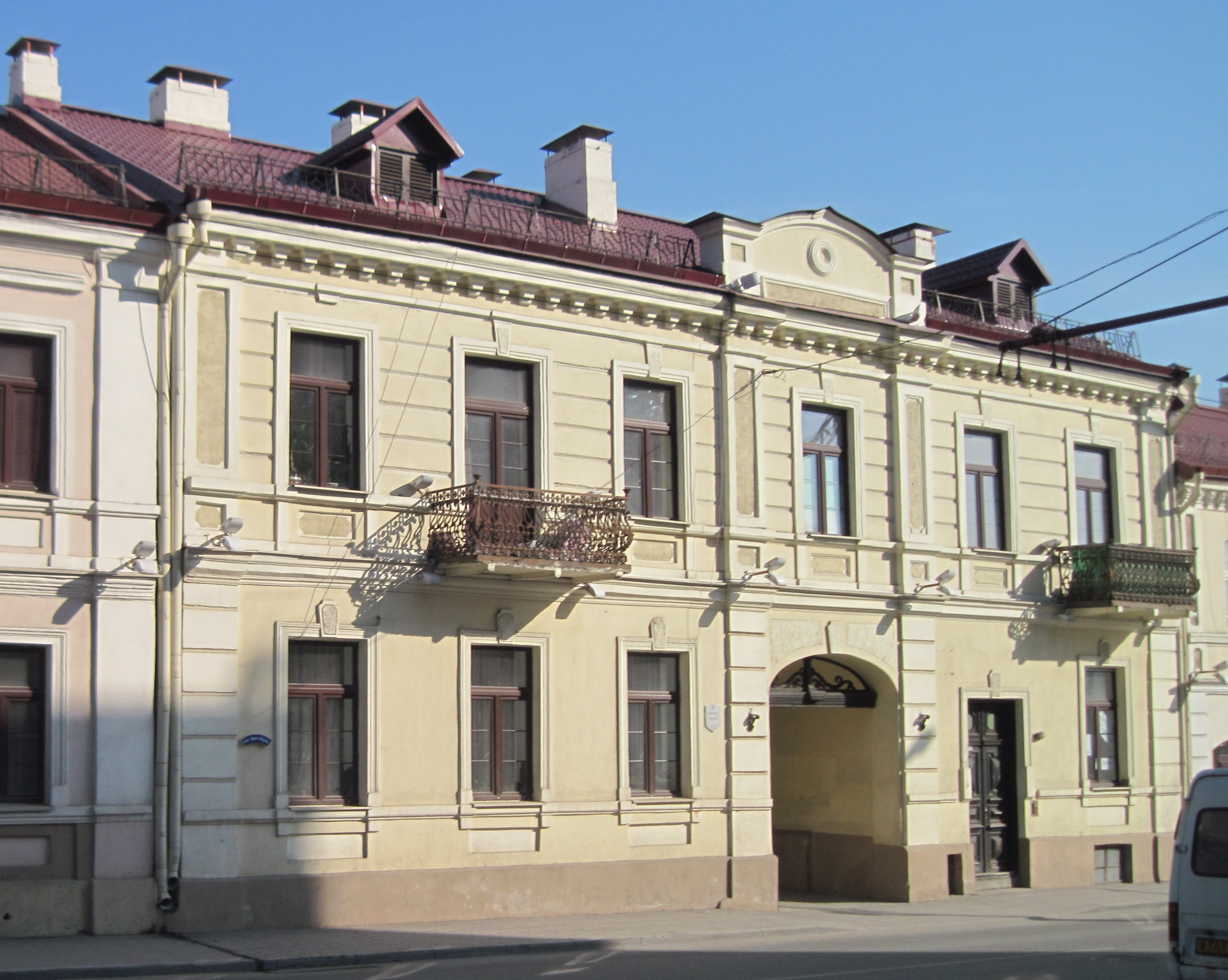 Забудова гістарычнага цэнтра Гродна. Вуліца К. Маркса, 34